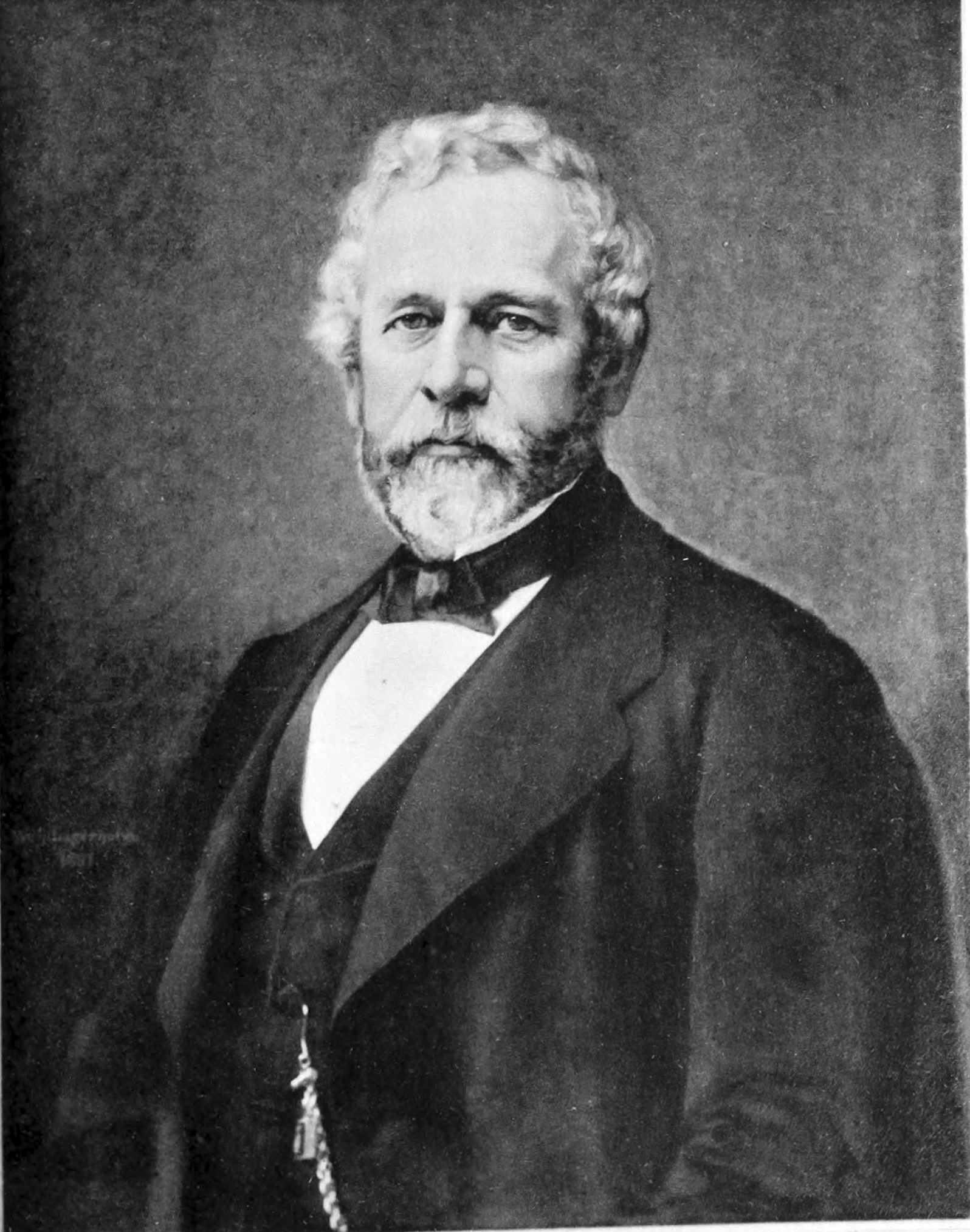 Hjalmar August Abelin (1817-1893)